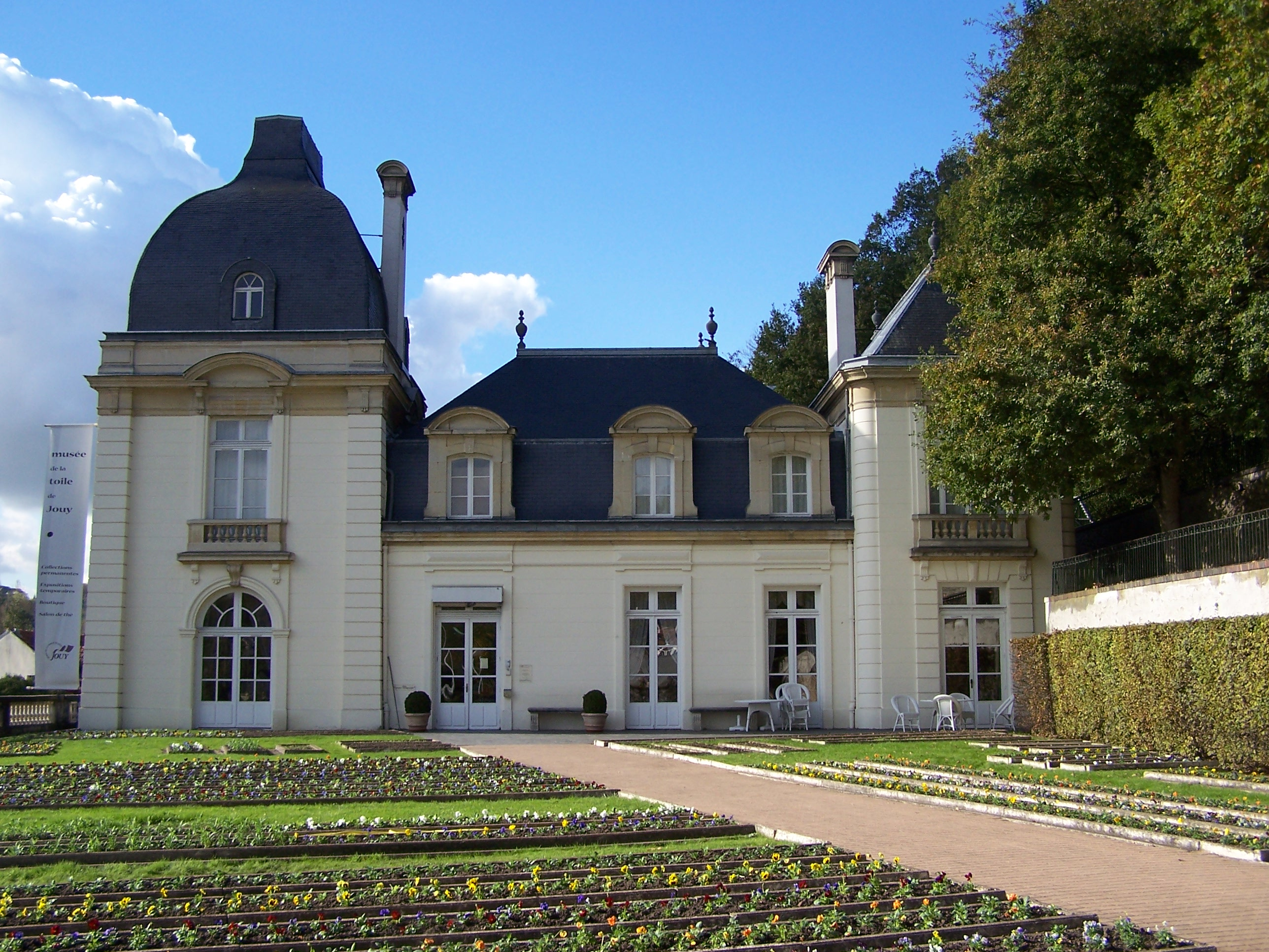 Château de l'Églantine à Jouy-en-Josas (Yvelines, France), musée de la toile de Jouy